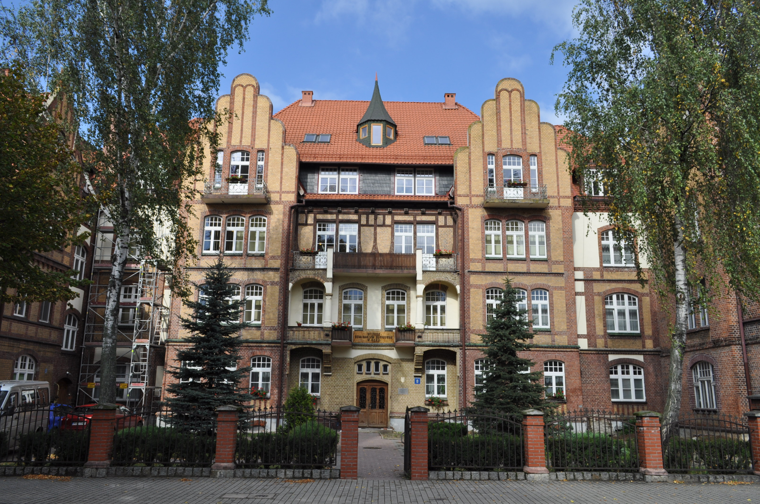 Ełk, ul. Kościuszki 9 - budynek Wyższego Seminarium Duchownego (zabytek nr A-3703)